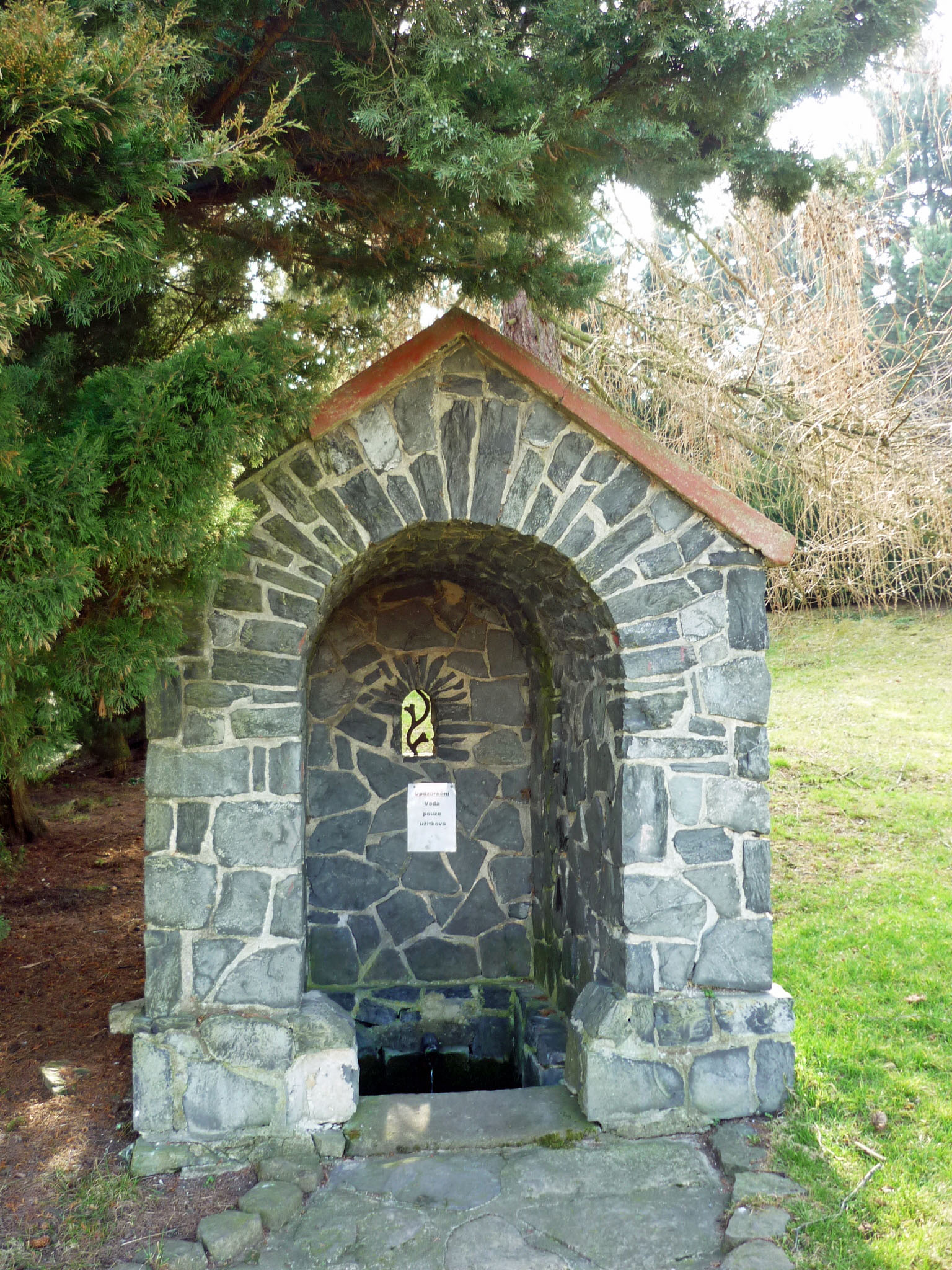 Marienbrunnen in Kostenblatt (Kostomlaty pod Milešovkou) im Böhmischen Mittelgebirge